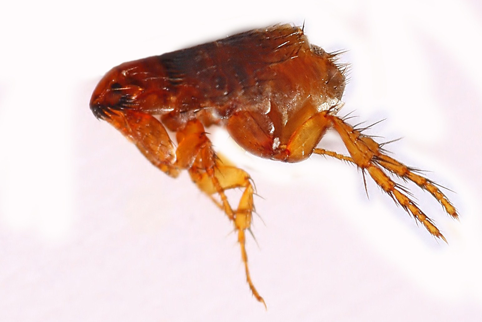 toter Katzenfloh